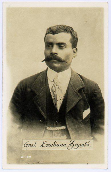 Général Emiliano Zapata - 1914